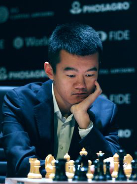 Дин Лижэнь, Турнир Претендентов 2018